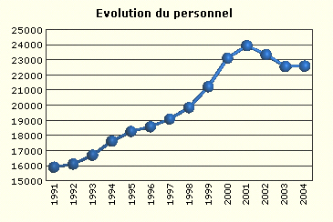 D'Beschäftegten an de Banken